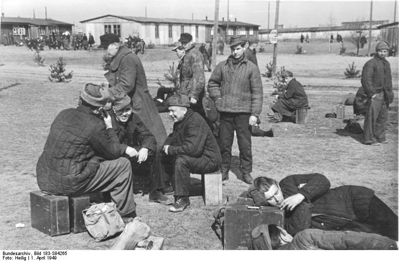 ADN-ZB-Illus-Heilig Heimkehrer aus der Sowjetunion, 1.4.49; Täglich treffen in Frankfurt/Oder neue Transporte mit heimkehrern aus der Sowjetunion ein. Kurz vor der Entlassung aus der Hornkaseren, eine letzte Rast auf dem Gepäck, ehe es aus dem Lager geht. 3020-49